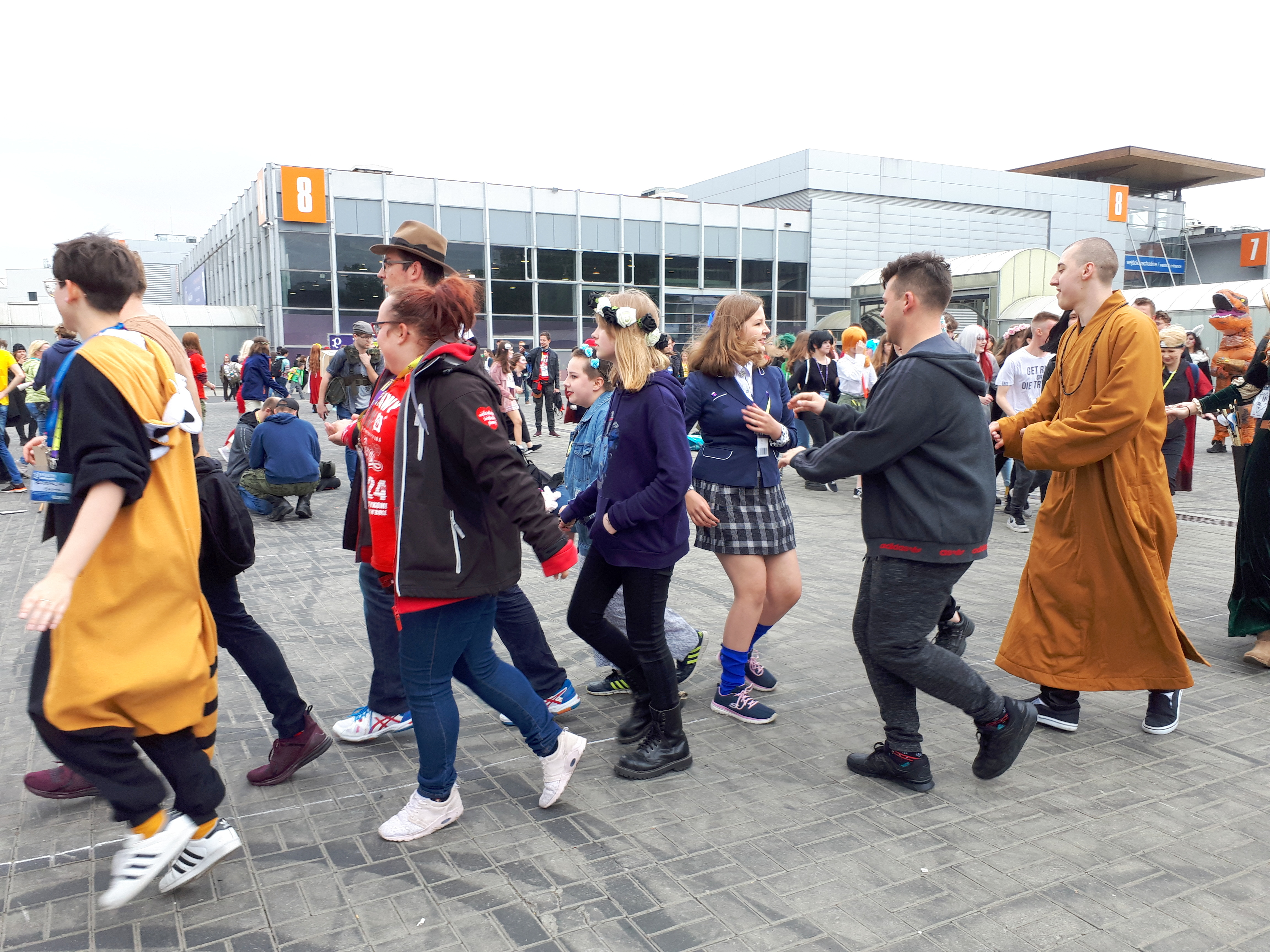 Uczestnicy konwentu Pyrkon 2019. Taniec "belgijka".